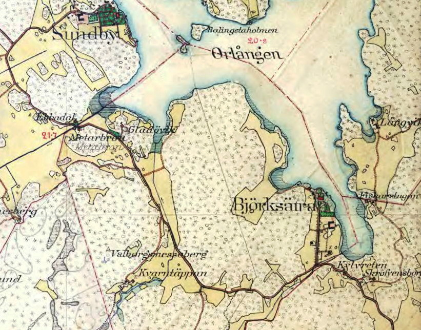 Häradskartan, 1901-06, Lantmäteriet Gävle.